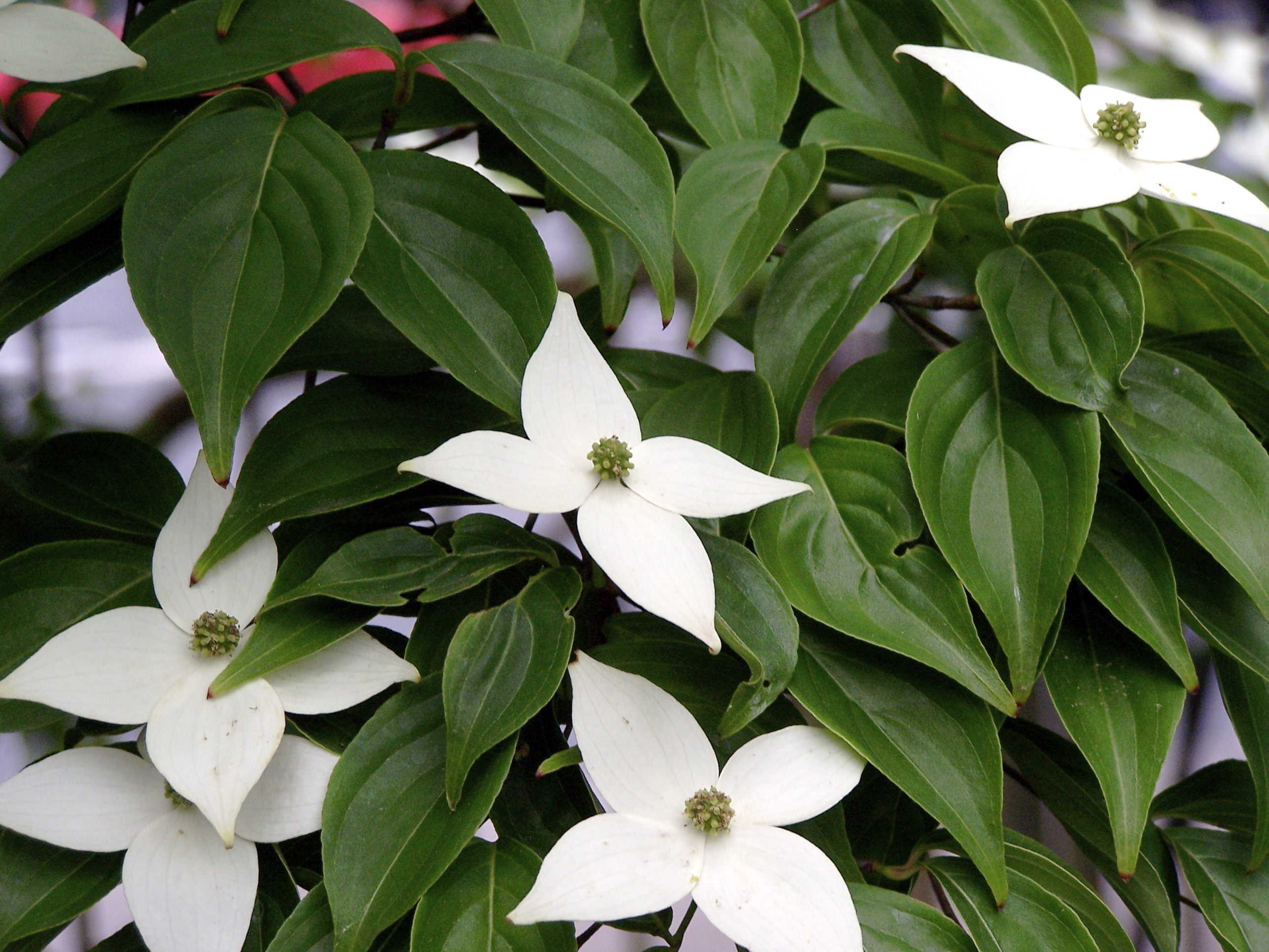 Cornus kousa ; Vieux jardin botanique de Göttingen